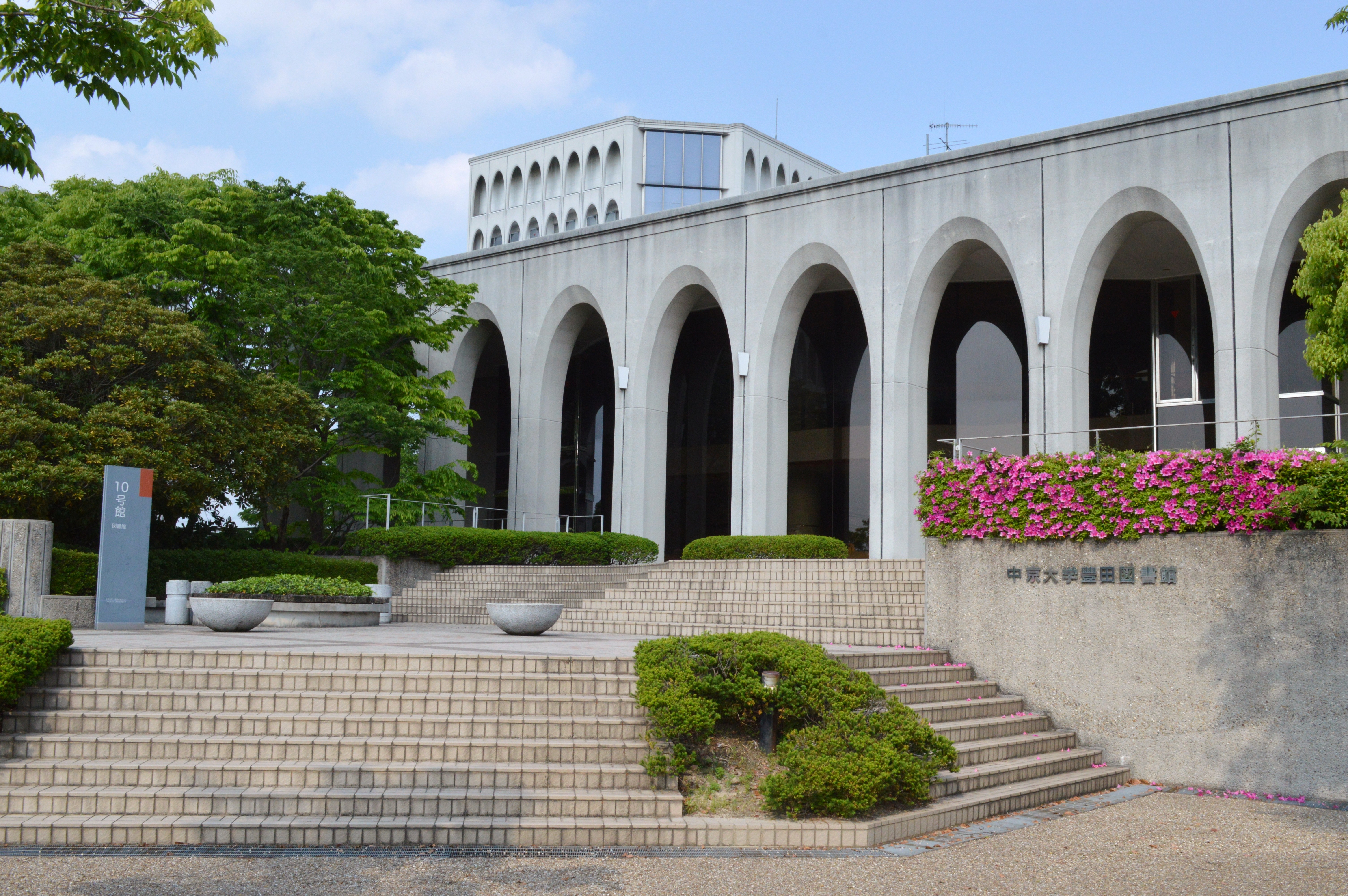 愛知県豊田市貝津町のの中京大学豊田キャンパスにある中京大学豊田図書館。